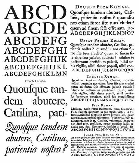 Fuente Caslon 1734